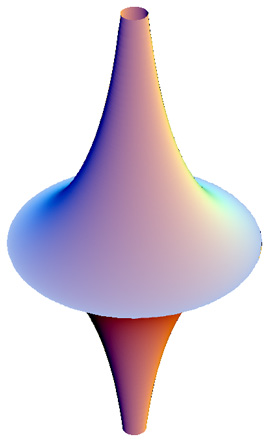 Pseudosphere